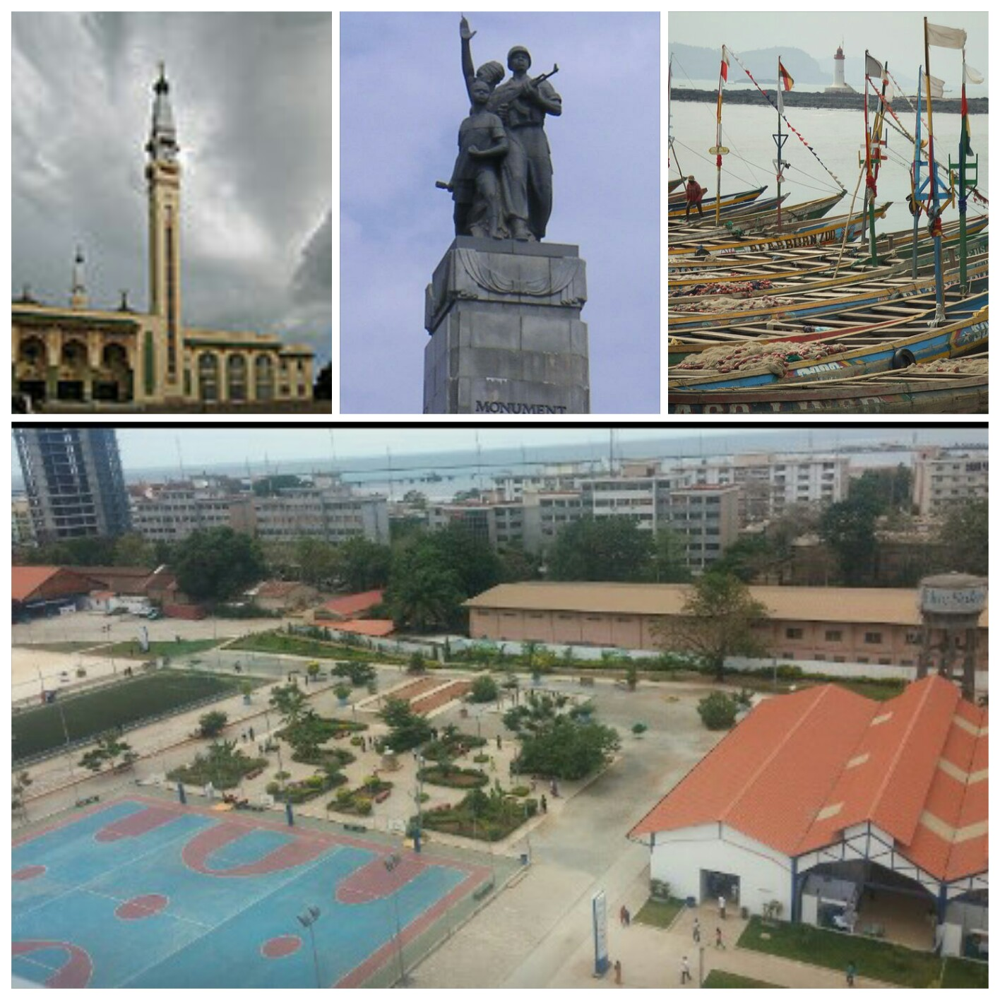 Montage photo de Conakry: le monument du 22 Novembre 1970,les bateaux de pêche ,la grande mosquée , le blue zone de Kaloum